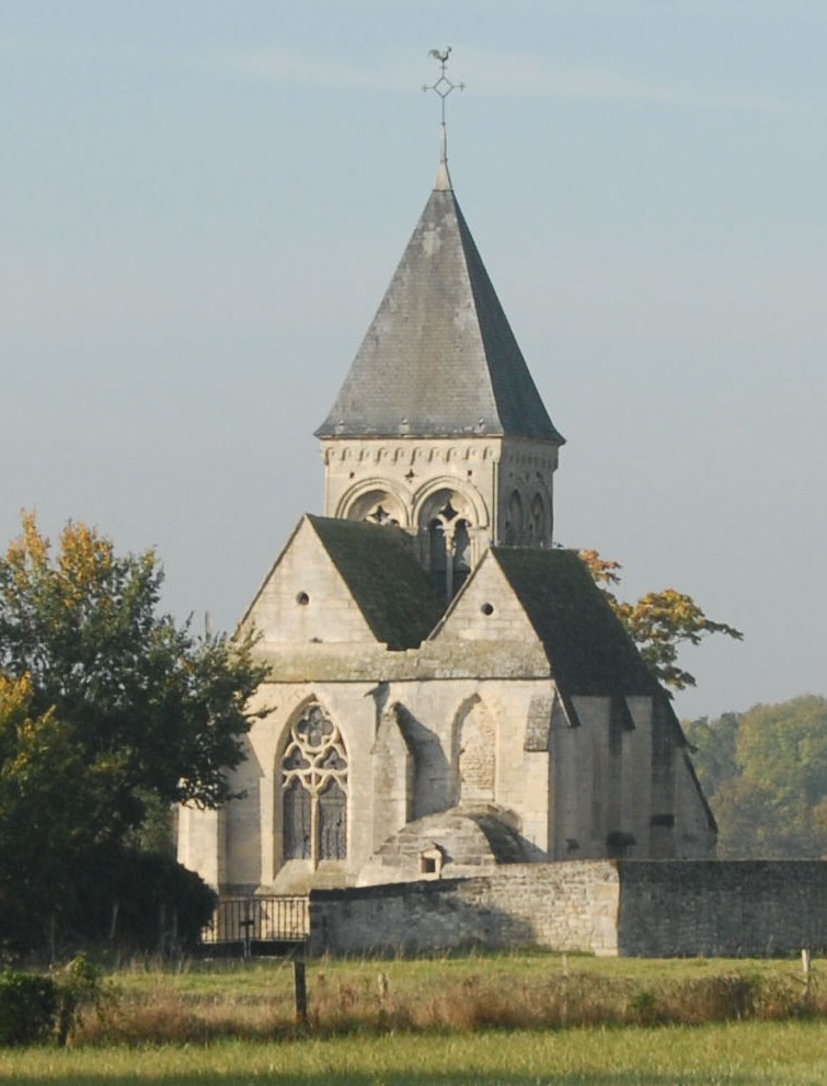 l'église saint martin de rousseloy